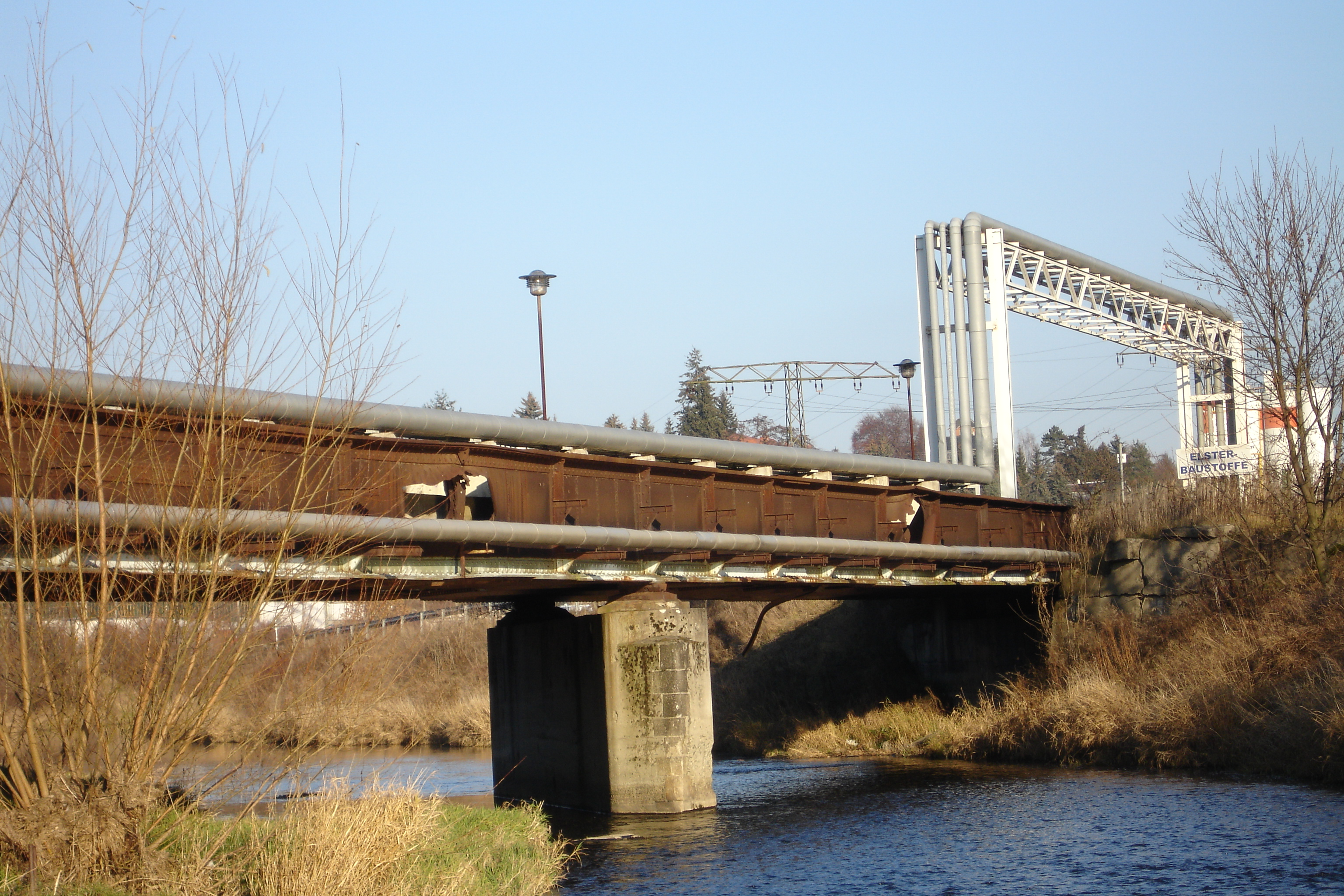 Die Panzerbrücke über die Weiße Elster auf dem ehemaligen VOMAG-Gelände in Plauen